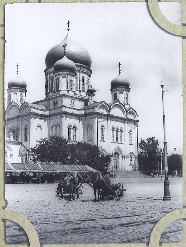 Вид на Ворошиловский проспект и площадь Советов. Собор Рождества Пресвятой Богородицы